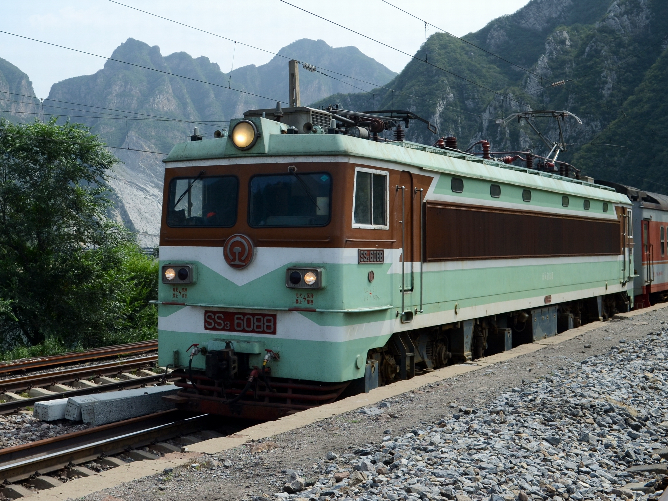 韶山3型(SS3)6088号电力机车担当牵引赣州至大同K729次列车任务通过丰沙铁路落坡岭车站